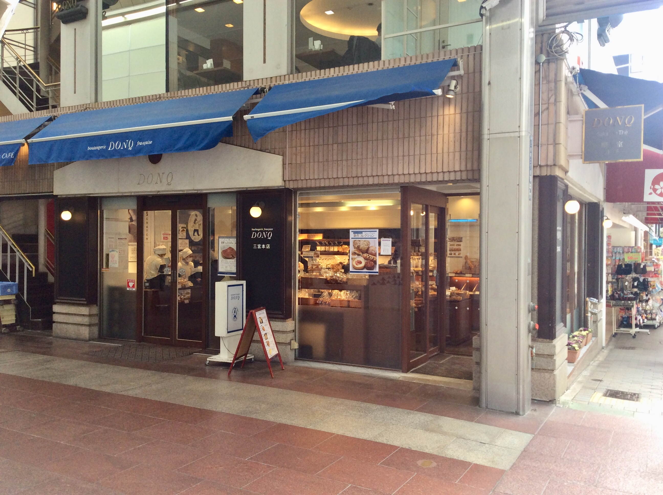 ドンク三宮本店